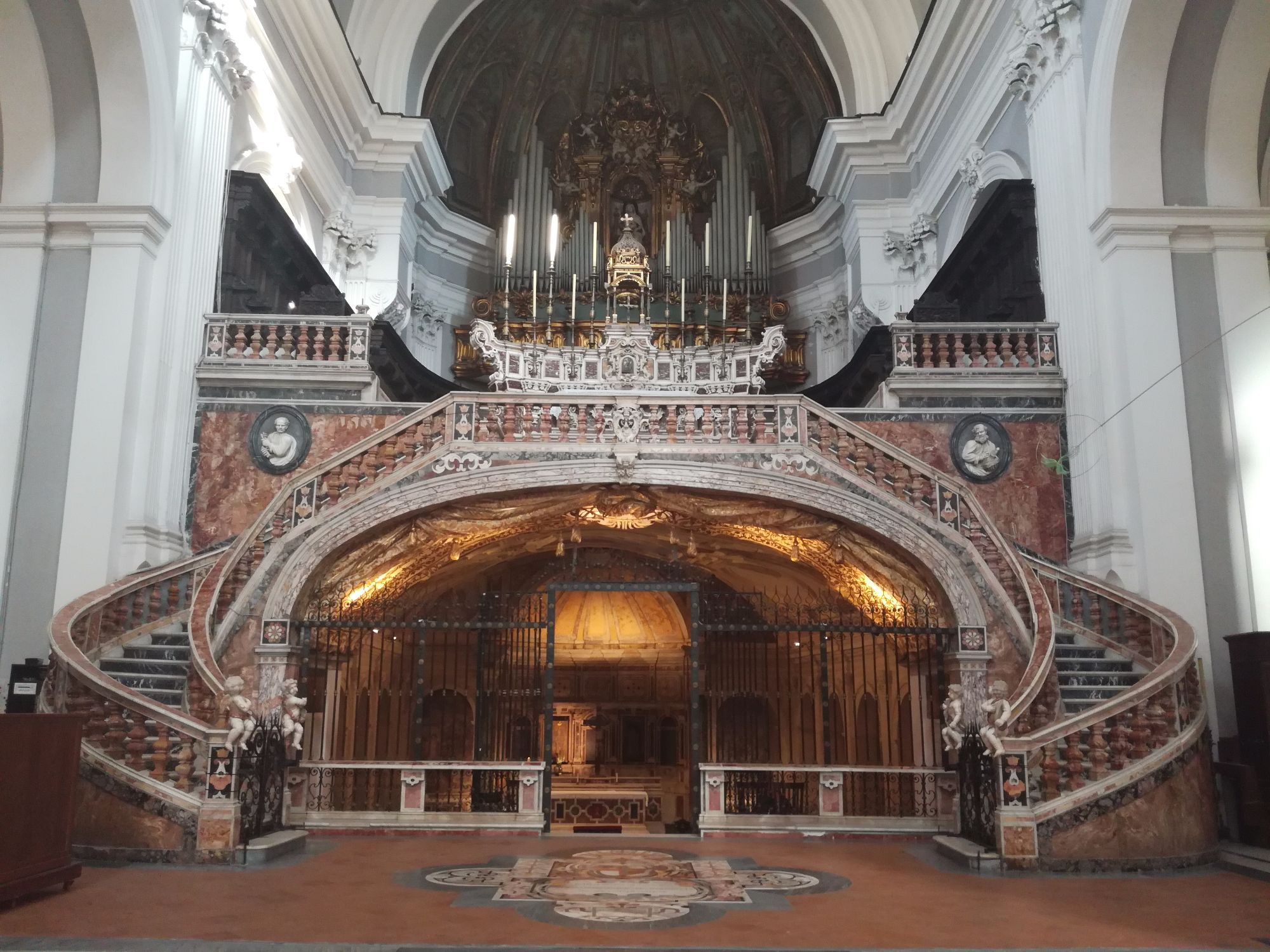 Basilica di Santa Maria della Sanità (Napoli)